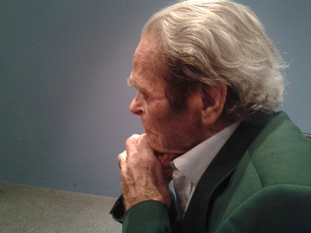 Miguel Baca Rossi